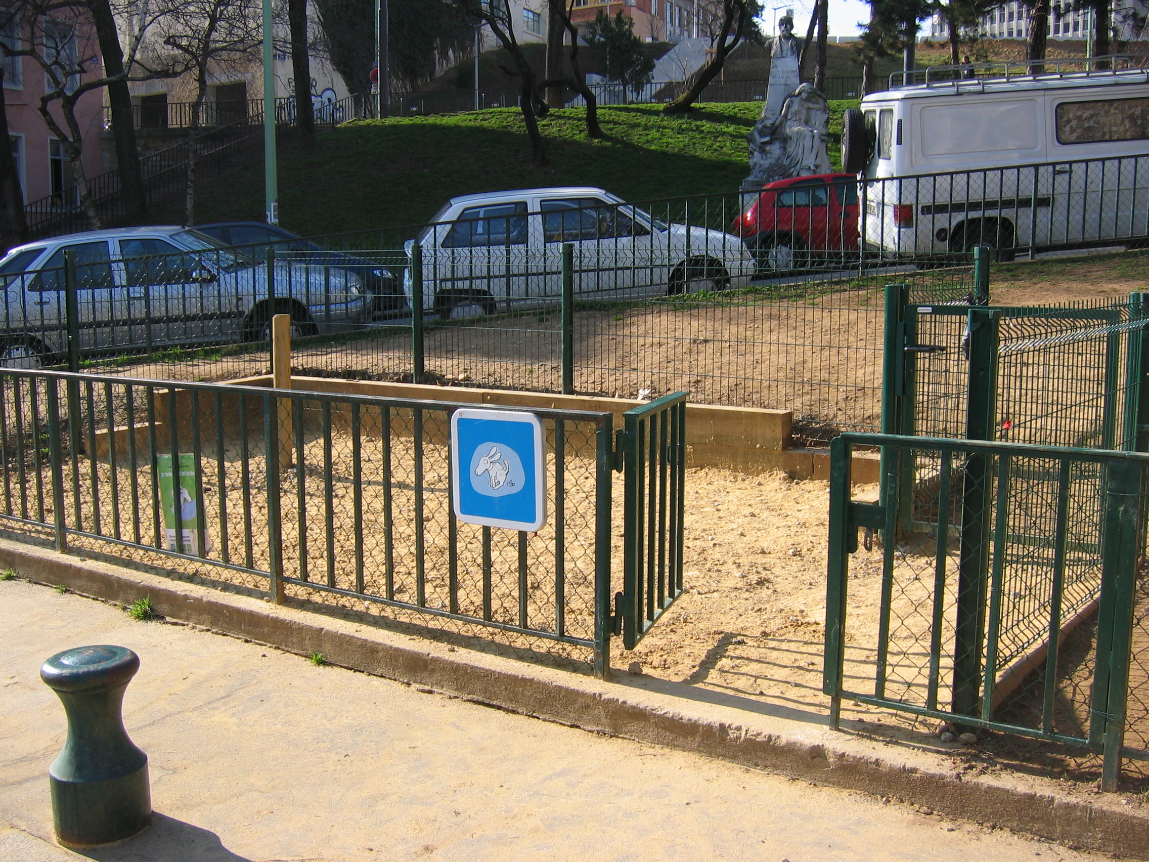 Aménagement canin au gros cailloux à Lyon